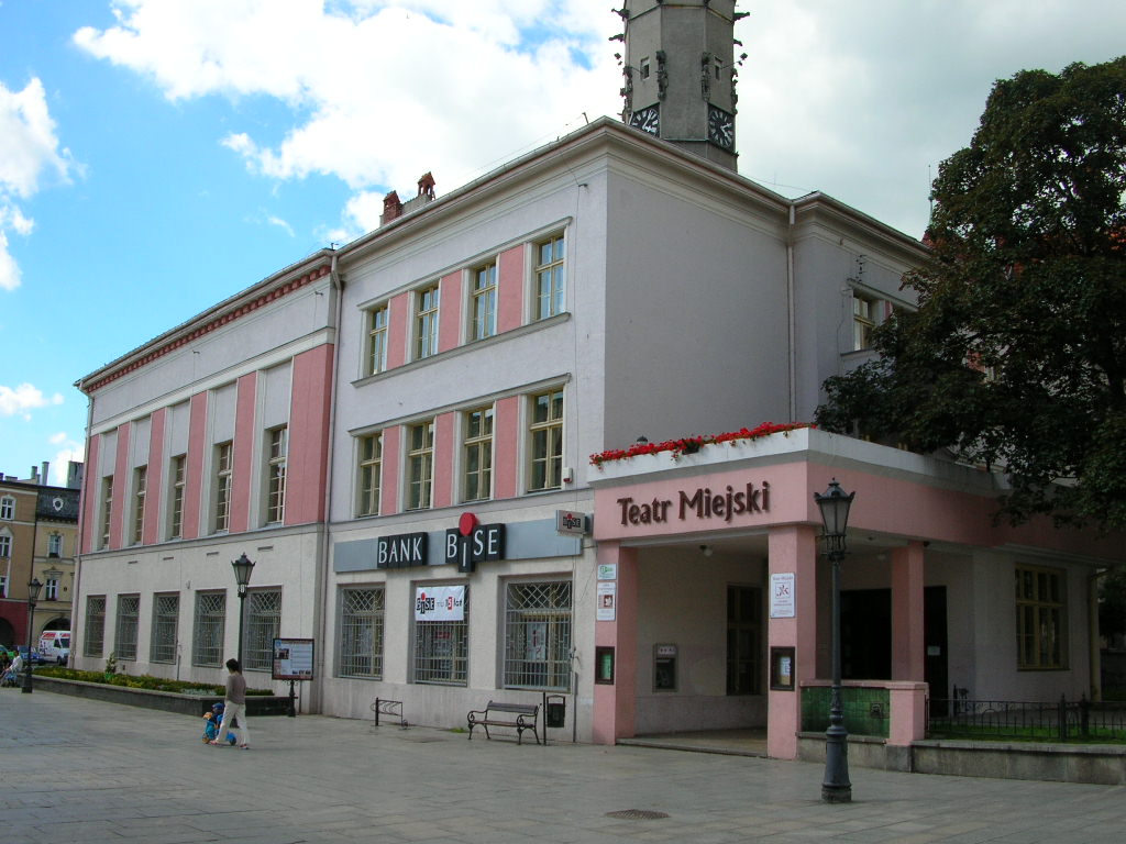 Jawor - Teatr Miejski.